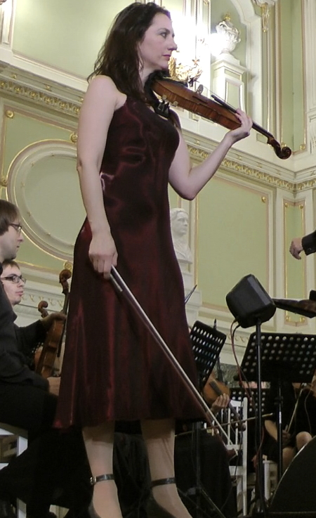 Первое исполнение сочинения Луи Андриссена La passion в Санкт-Петербурге. Моника Жермино (скрипка), Михаэла Ринер (сопрано), Московский Ансамбль Современной Музыки, дирижирует Юрьен Хемпел